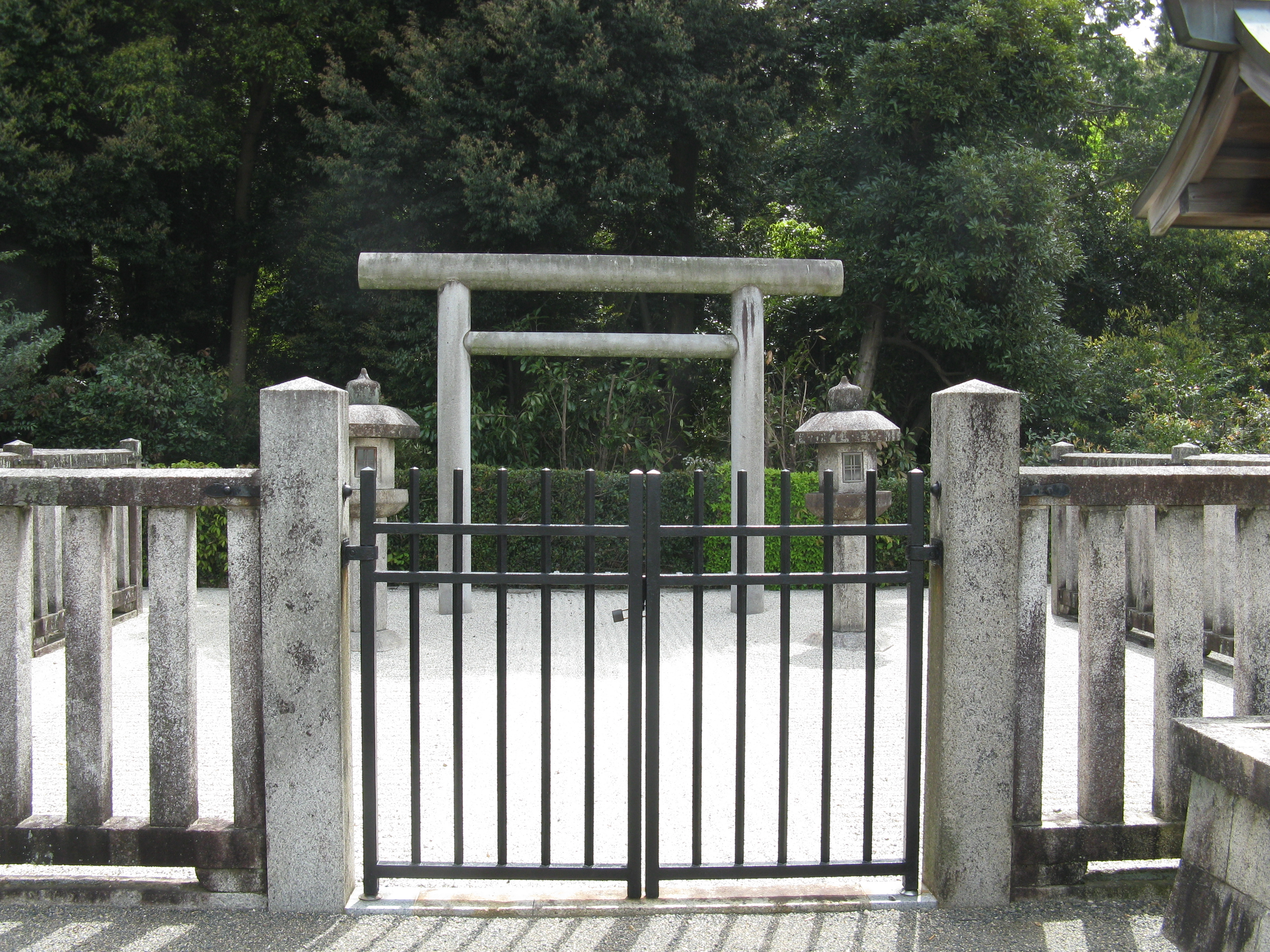 藤原聖子（皇嘉門院） 月輪南陵